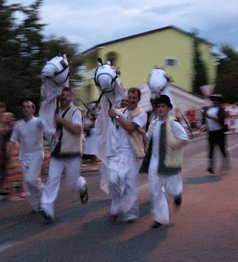 Maškare iz Nove Gradiške u Dramlju